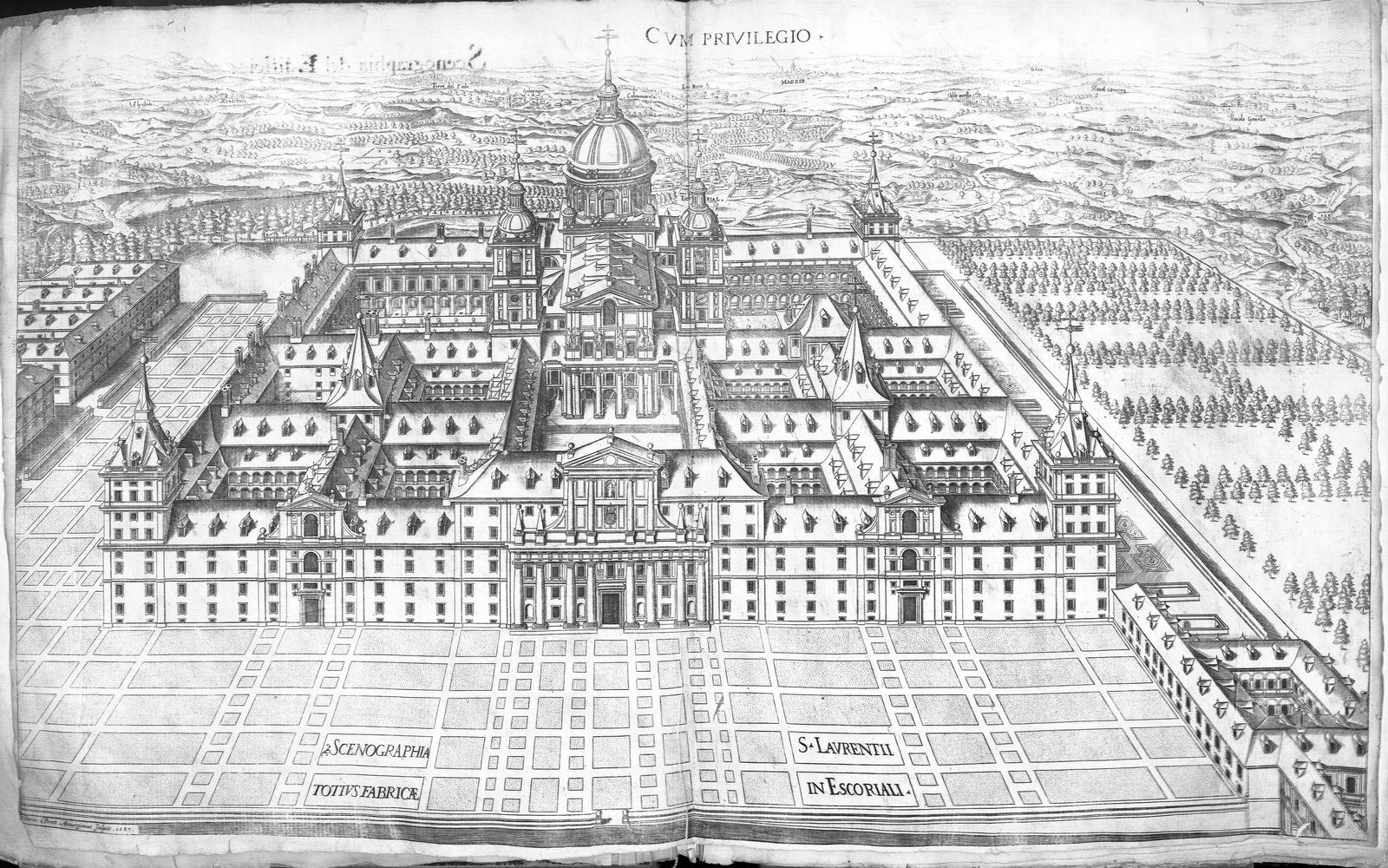 Diseños de toda la fábrica de San Lorenzo el Real del Escurial (sic) con las declaraciones de las letras, números y caracteres de cada uno, Madrid, 1694, Universidad de Sevilla